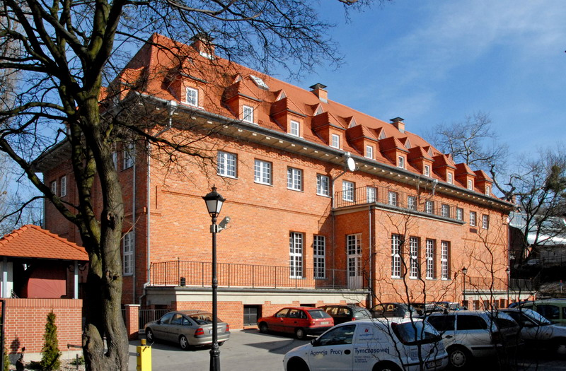 "Bratniak" we Wrzeszczu, ul. Siedlicka 4.